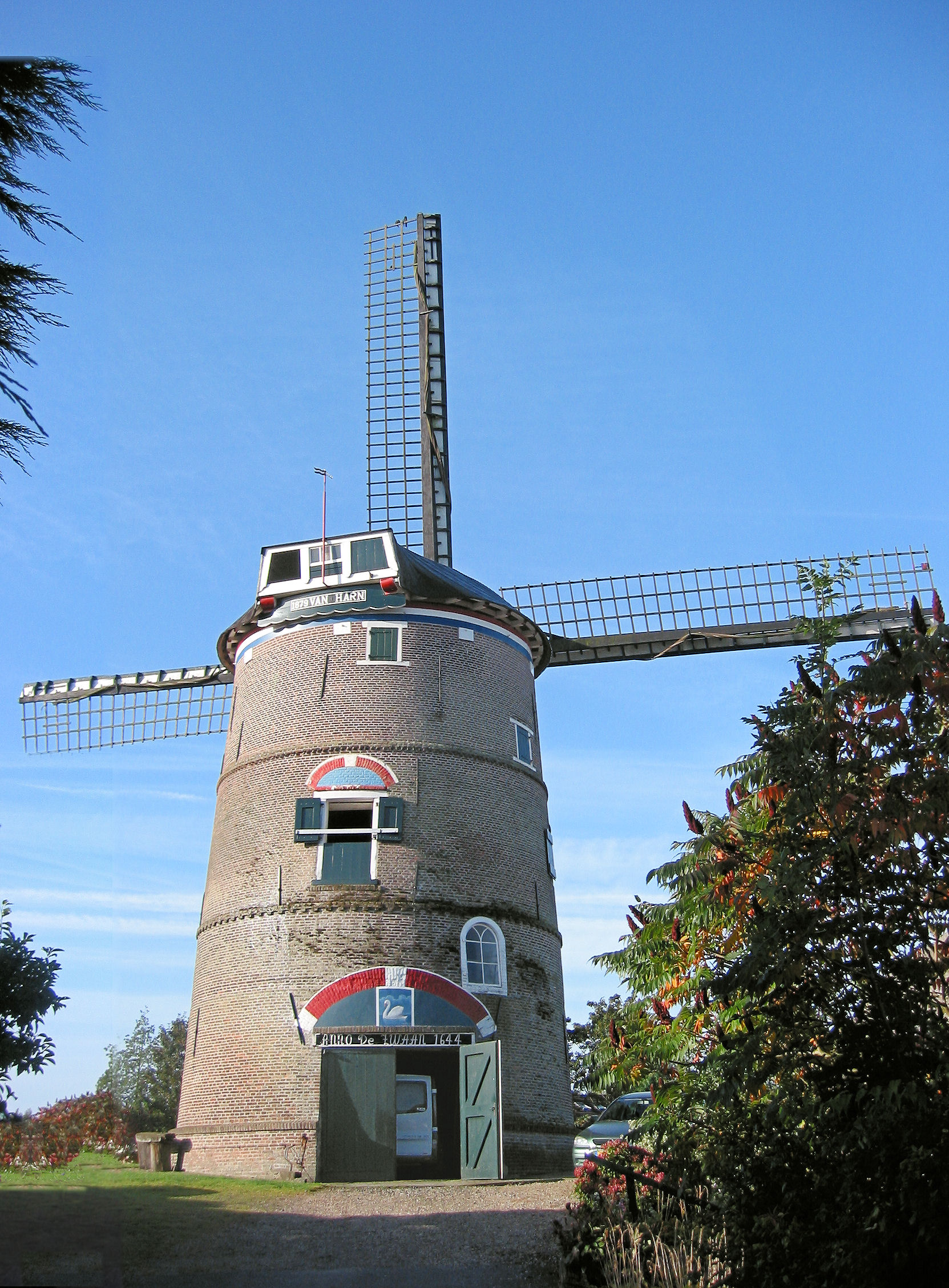 Molen De Zwaan ingangzijde, Lienden, Gelderland, the Netherlands